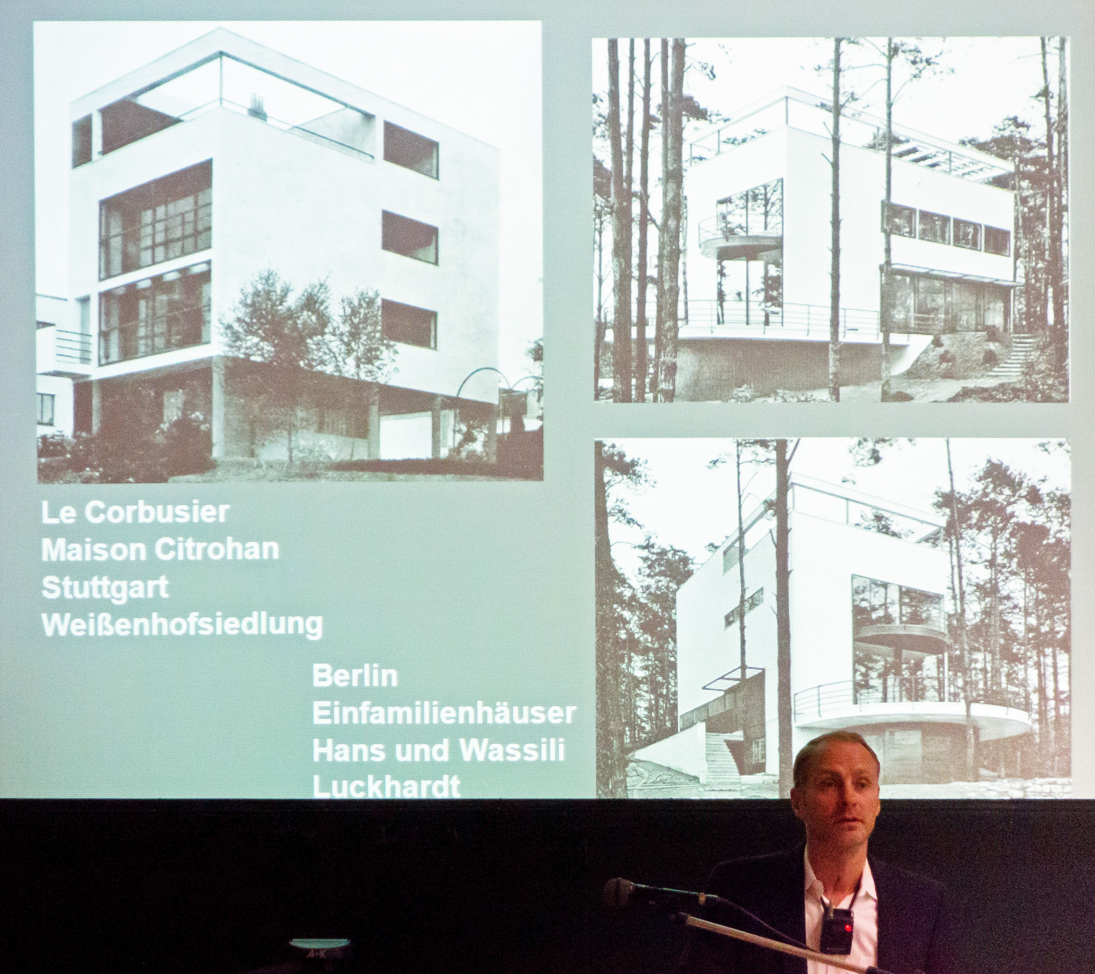 Vorlesung